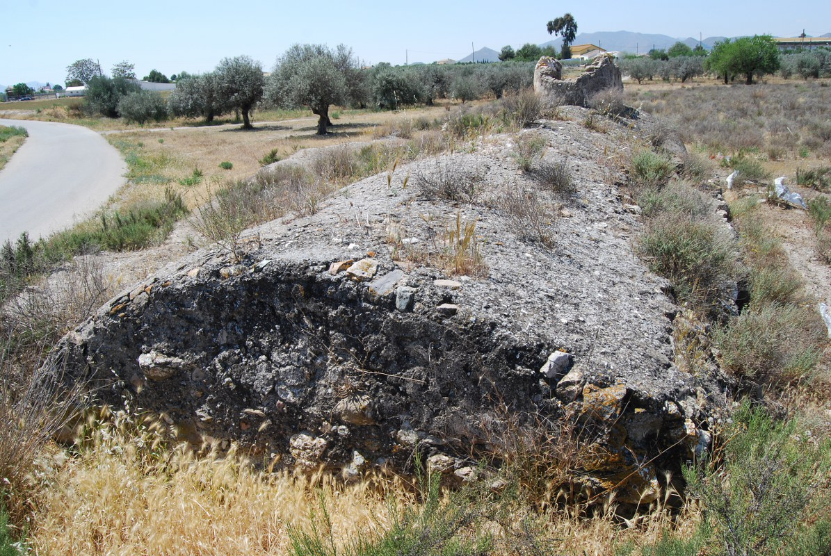 Vista posterior del Aljibe de la Estación de Puerto Lumbreras